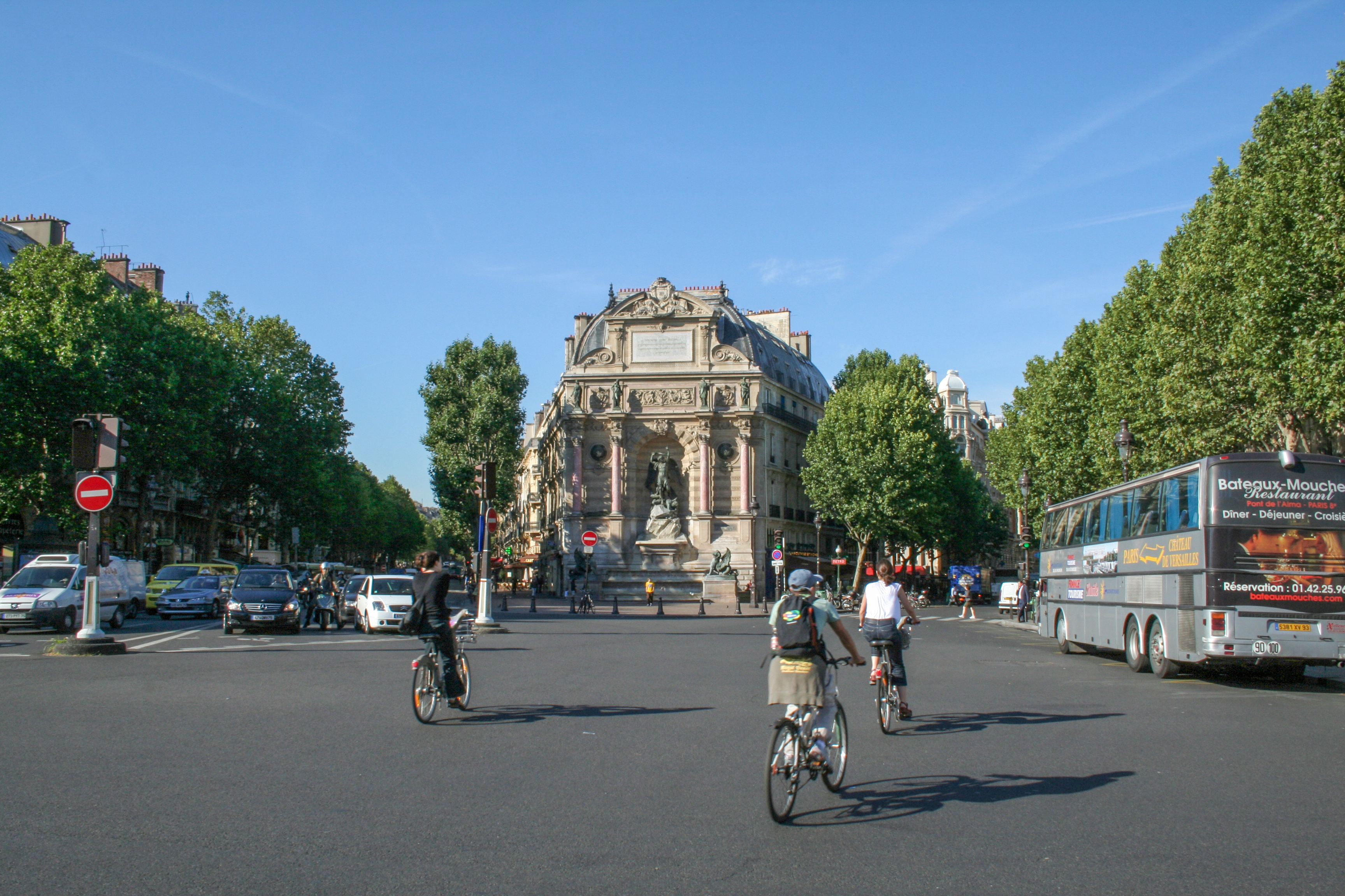 Vue de la place Saint-Michel et de la fontaine Saint-Michel